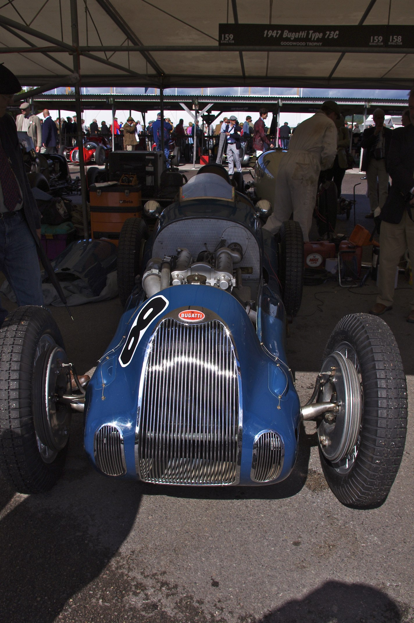 Goodwood Revival 2012